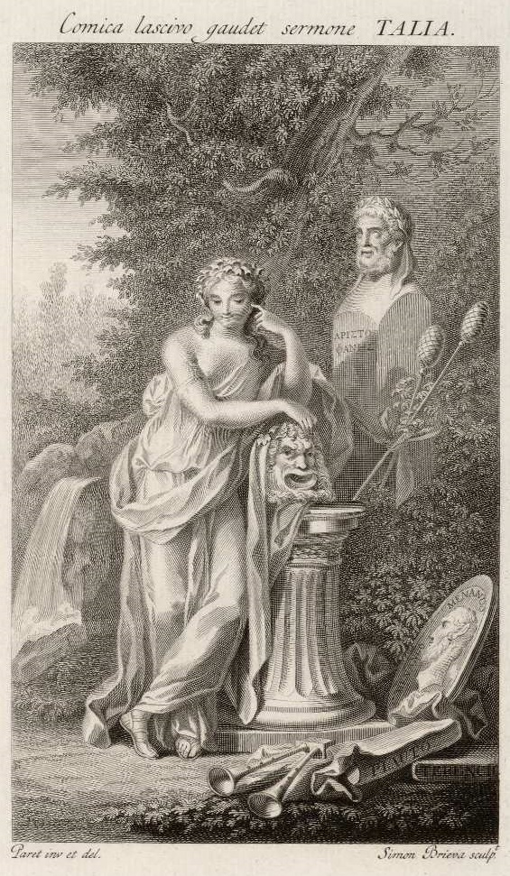 Talía, grabado en cobre de Simón Brieva por dibujo de Luis Paret, 1794. Inscripción: Comica lascivo gaudet sermone TALIA. Biblioteca Nacional de España